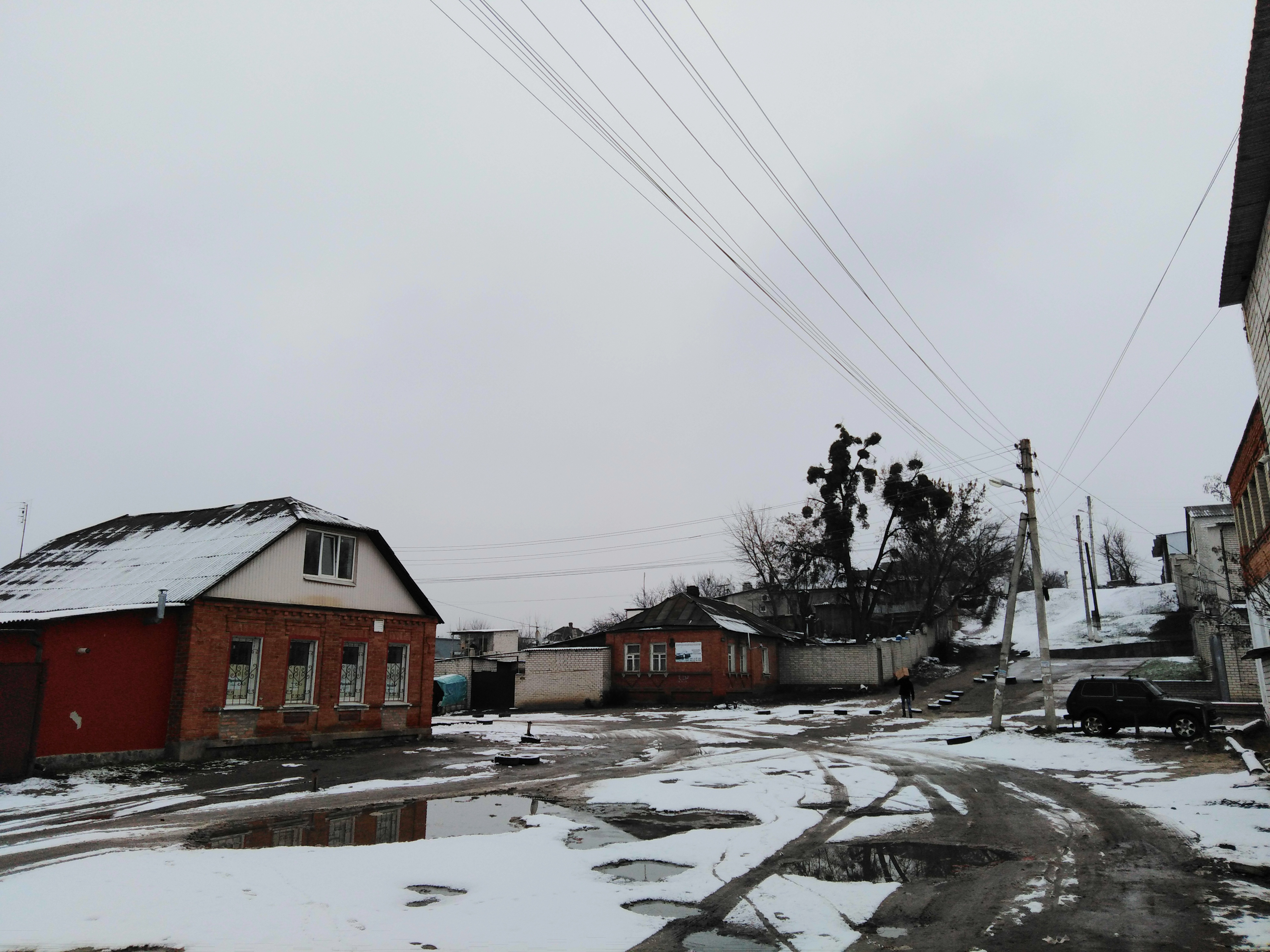 Україна, Місто Харків. Район Тюринка. Вулиця Варвари Каринської (до 2015 року Кашена марселя). Вулиця розташована впритул до Ринку Барабашова, та використовується як складська зона.